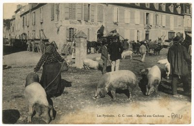 Euskal Txerriak Pauen joan den mendean